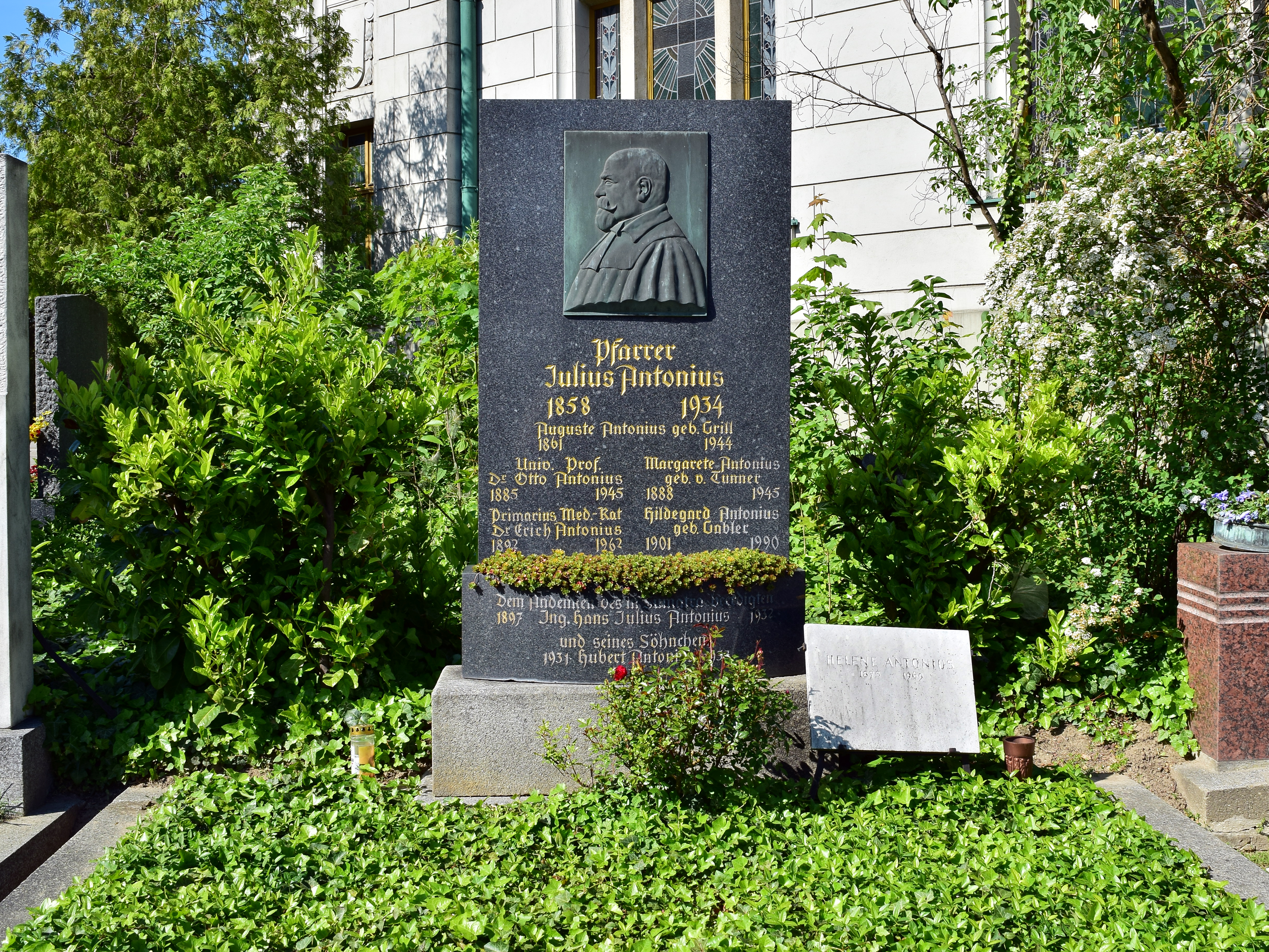 Ehrenhalber gewidmetes Grab von Julius und Otto Antonius auf dem evangelischen Friedhof im Wiener Zentralfriedhof